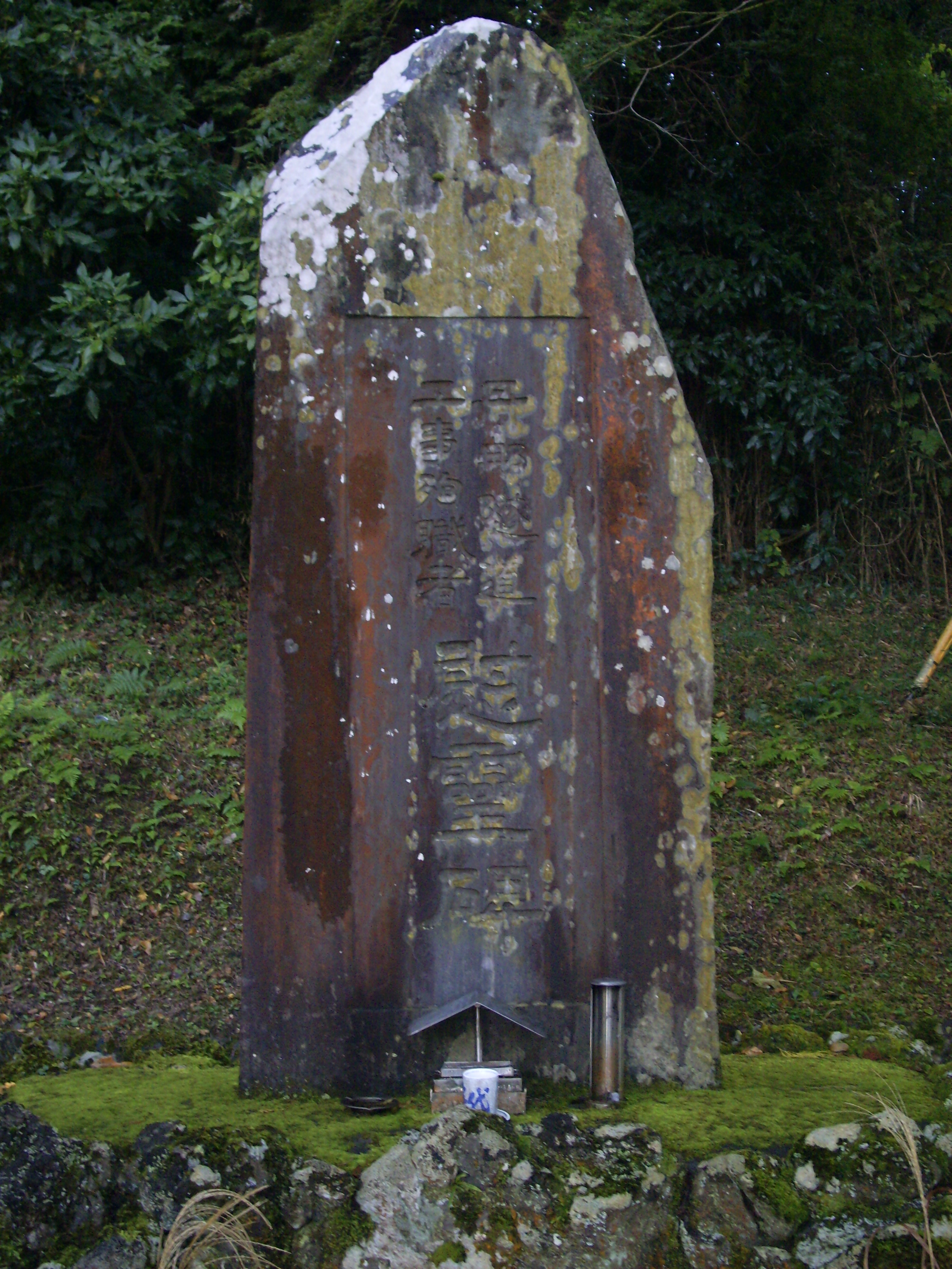 丹那トンネル工事殉職者慰霊碑 ㊟カメラを起動すると日付機能が出荷時のものに初期化されるため、ファイル履歴の撮影日時とメタデータの原画像データの生成日時が異なります